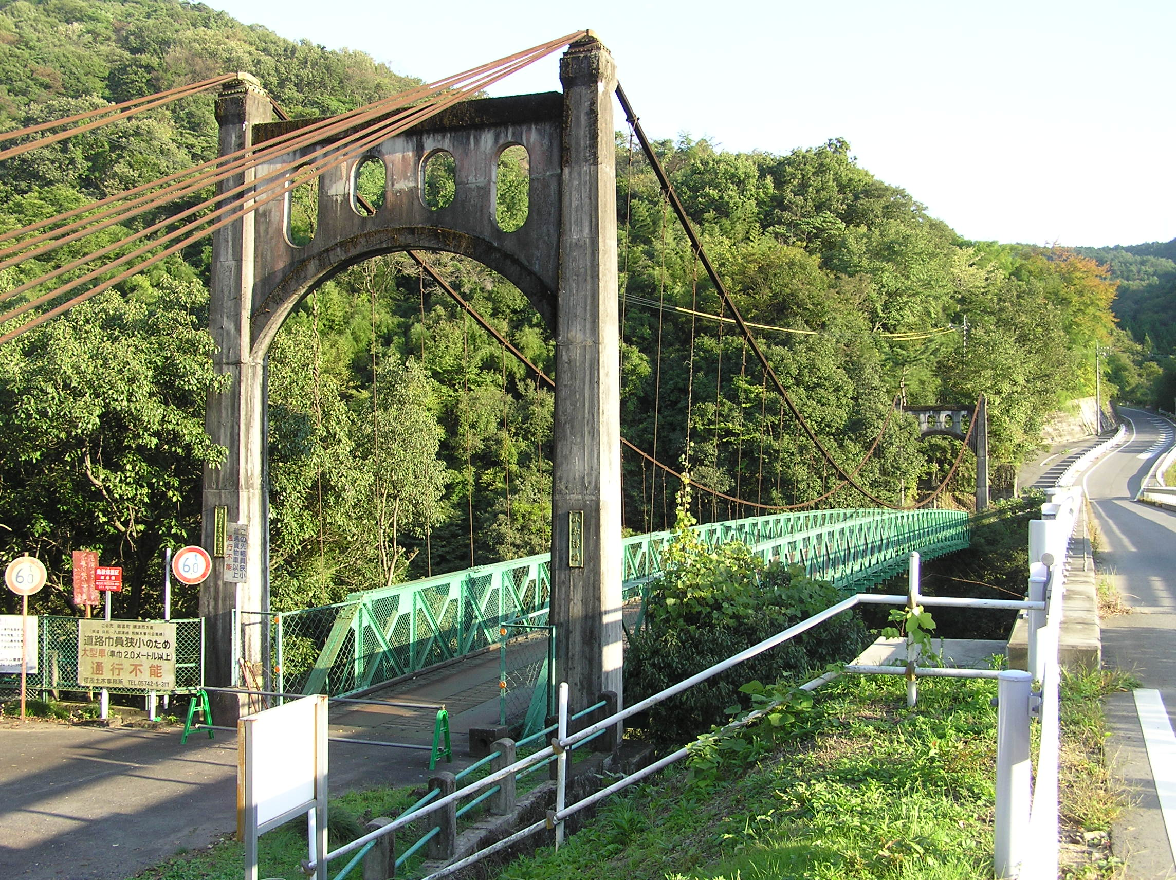 小和沢橋(岐阜県可児郡御嵩町、加茂郡八百津町)